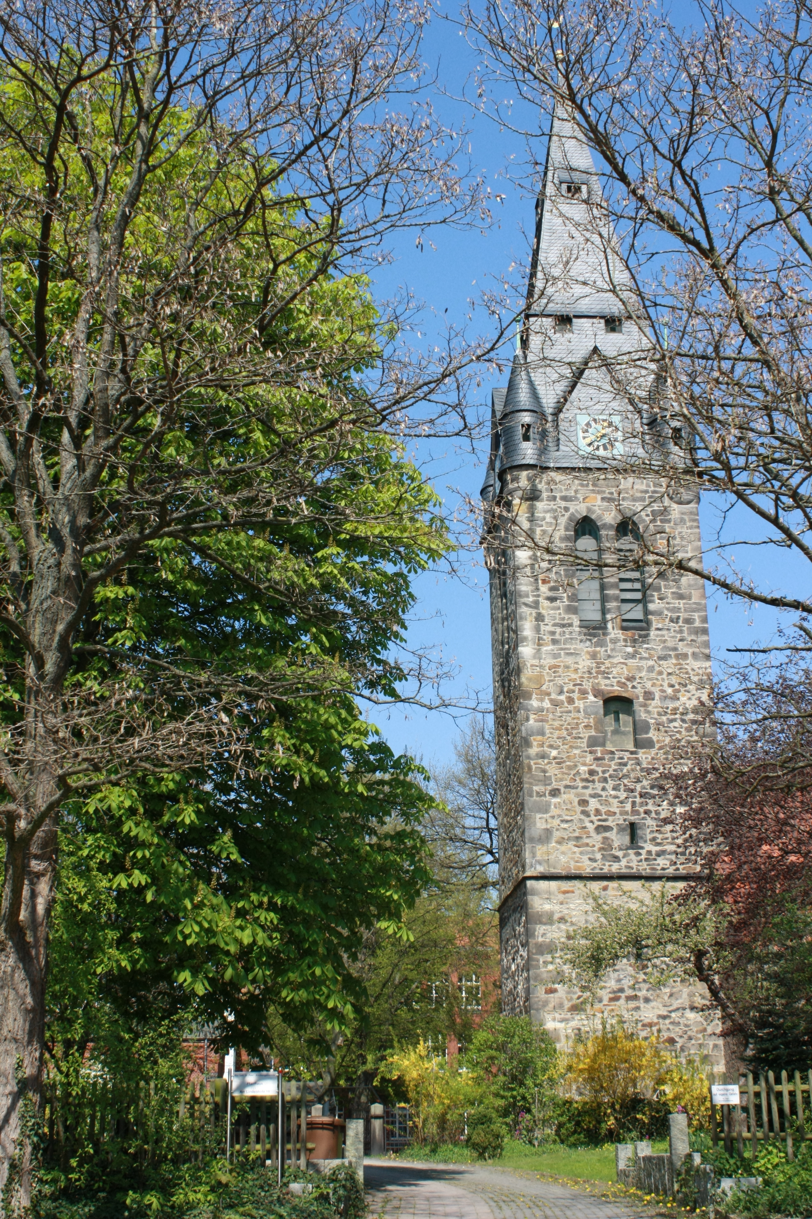 Kirchturm der St.-Petri-Kirche in Hannover-Döhren von Süden